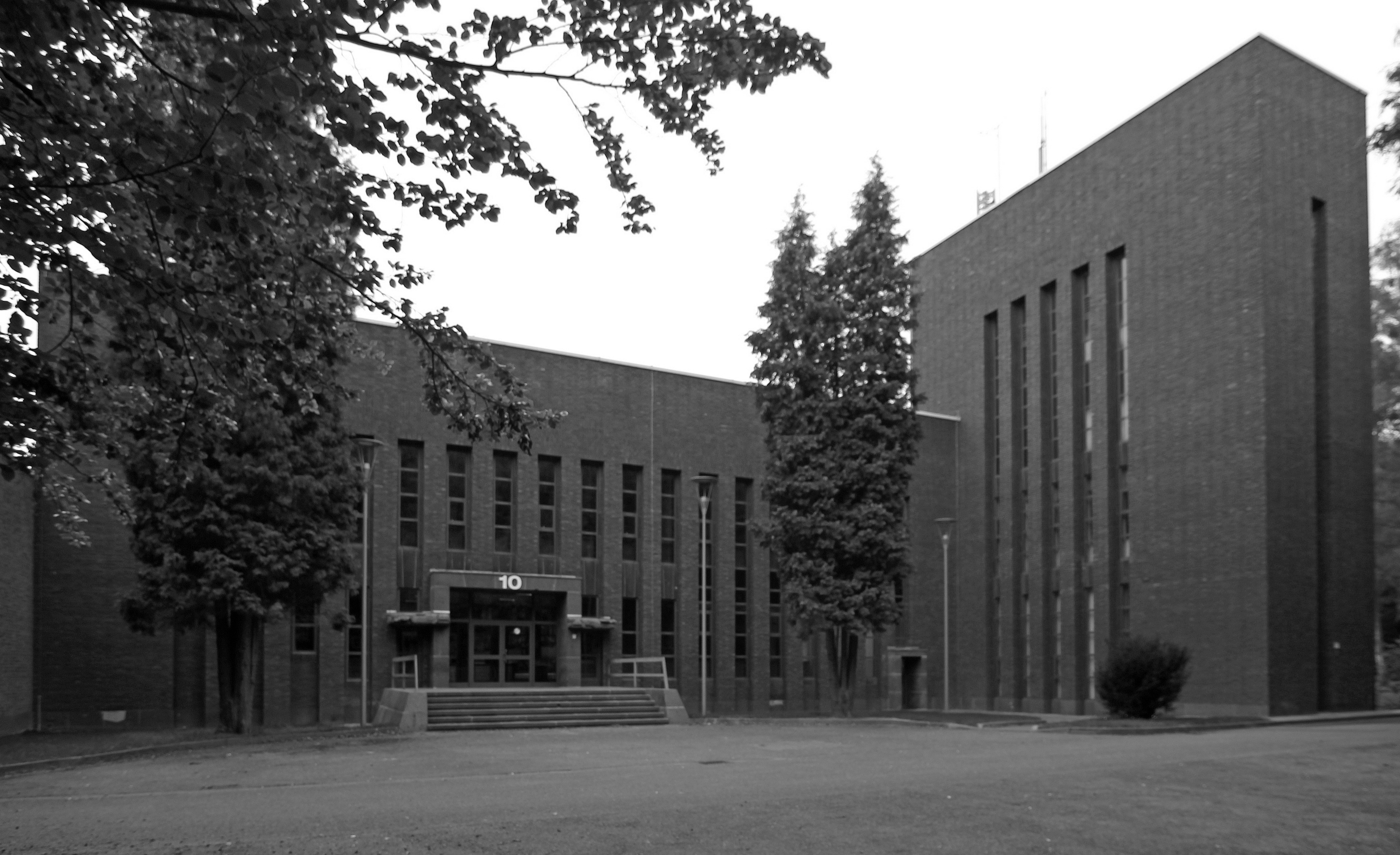 Wasserwerk Weiler, Blockstraße 8 This is a photograph of an architectural monument.